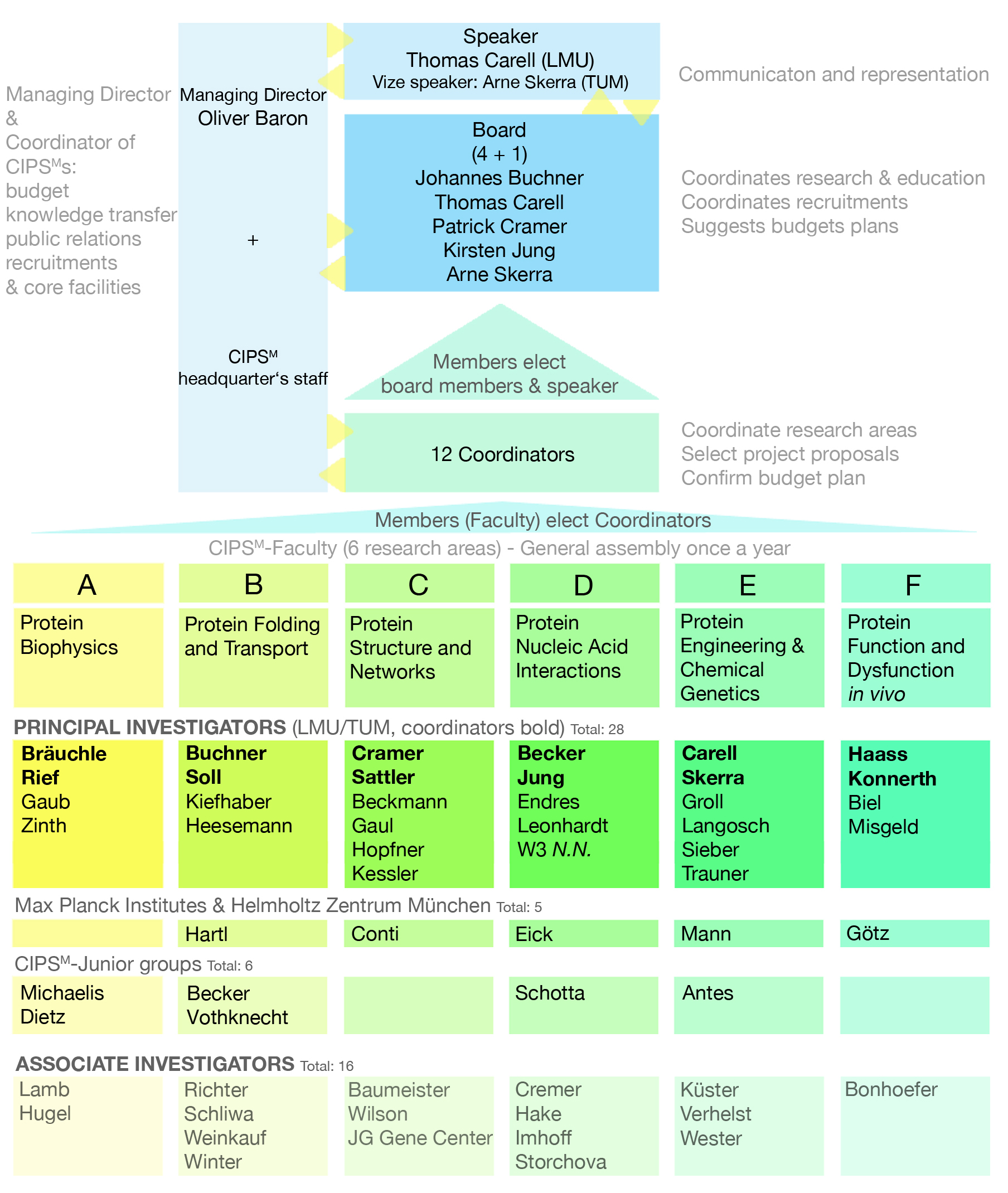 Organigramm des Center for Integrated Protein Science Munich